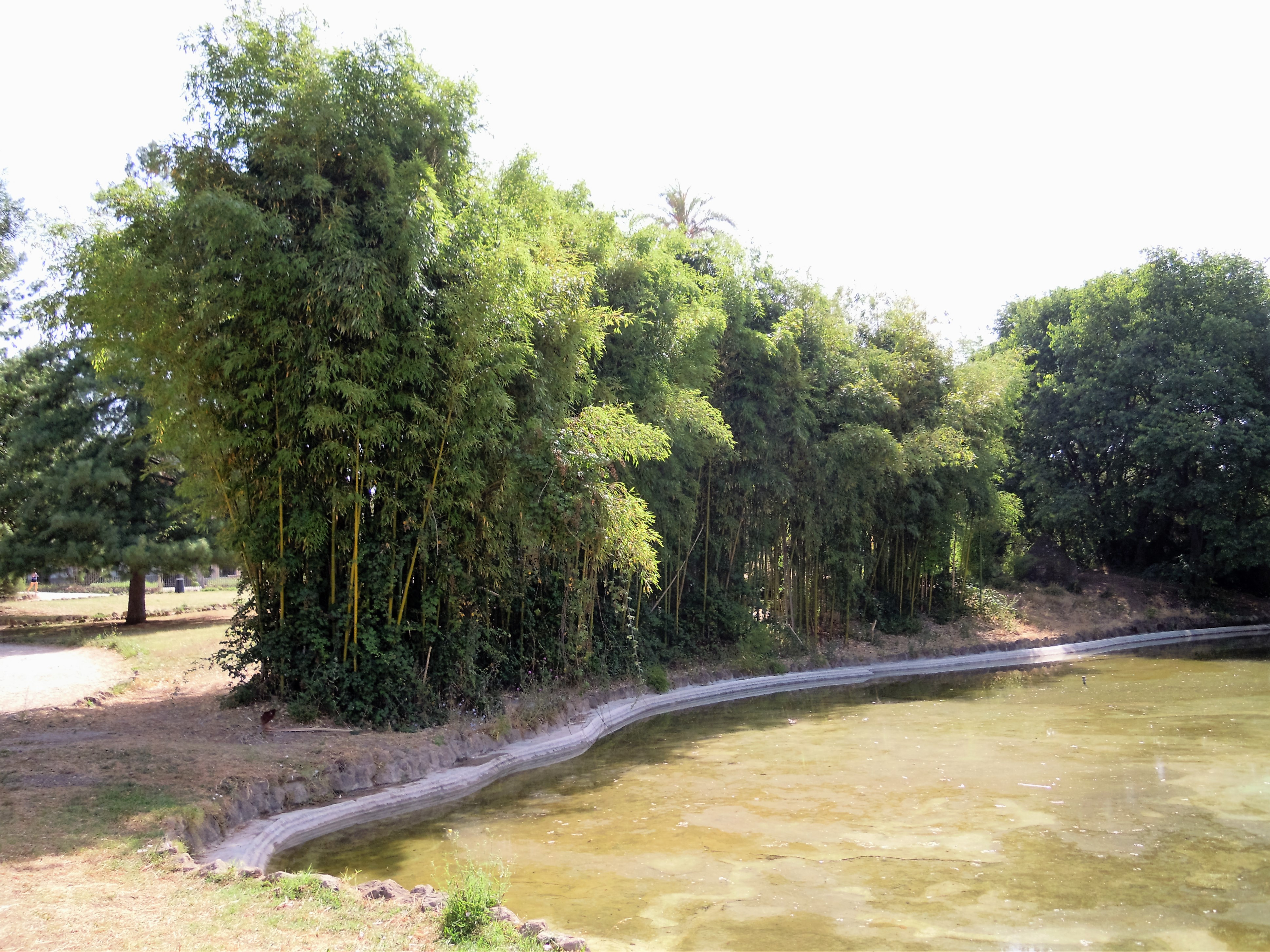 Roma, Villa Torlonia: boschetto di bambù sulla riva del laghetto del Fucino